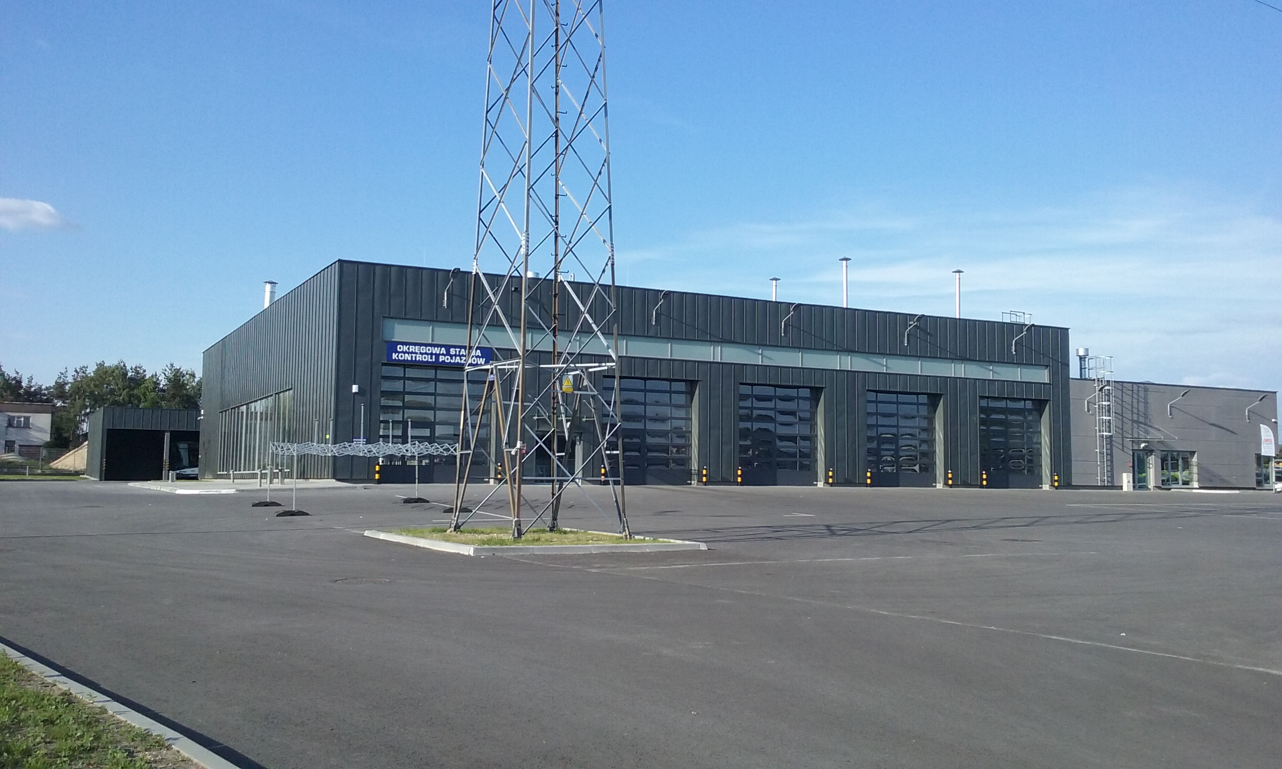 Nowa baza Mijskiego Zakładu Komunikacyjnego w sześćdziesięcio tysięcznym Tomaszowie Mazowieckim w województwie mazowieckim wybudowana w 2018 roku